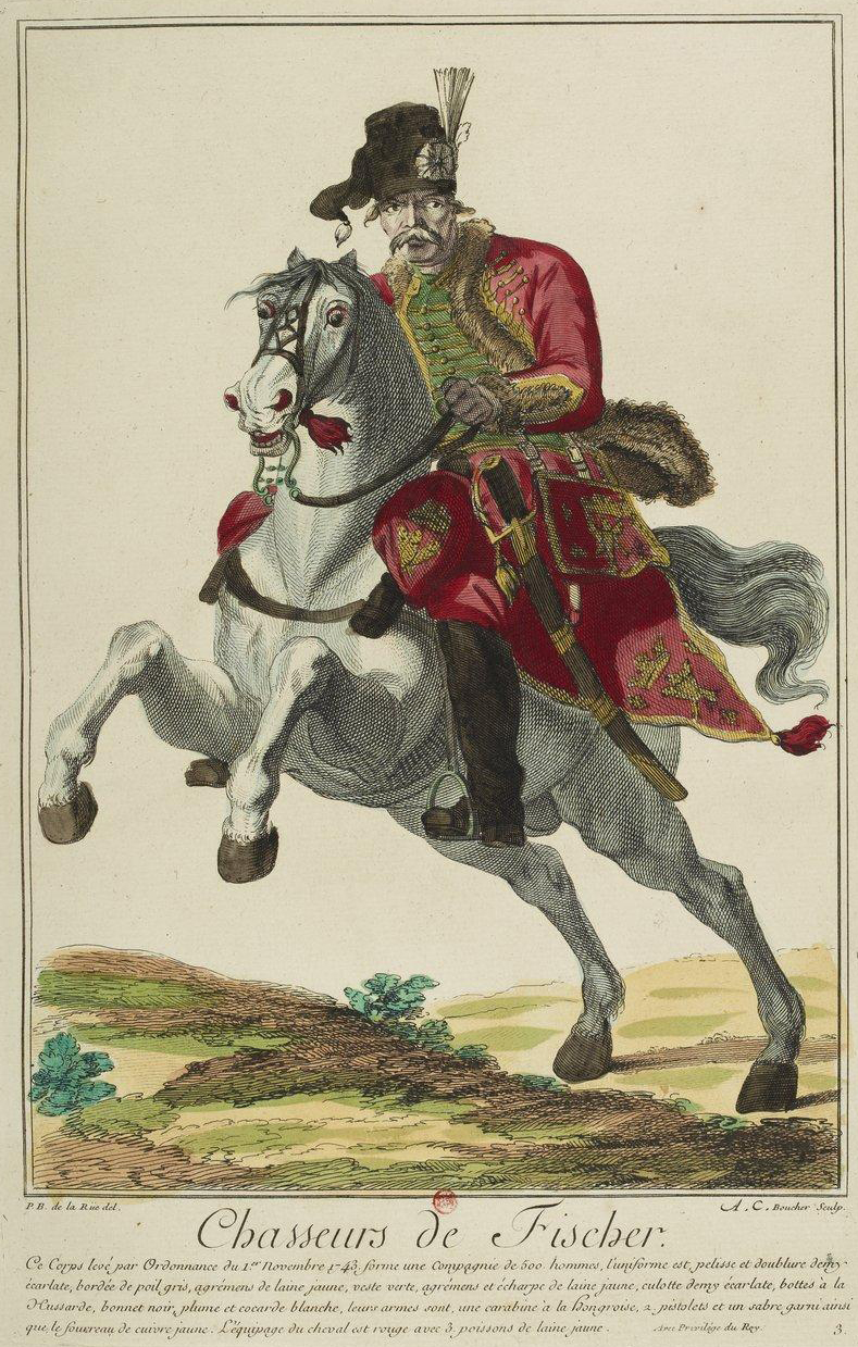 Chasseurs de Fisher